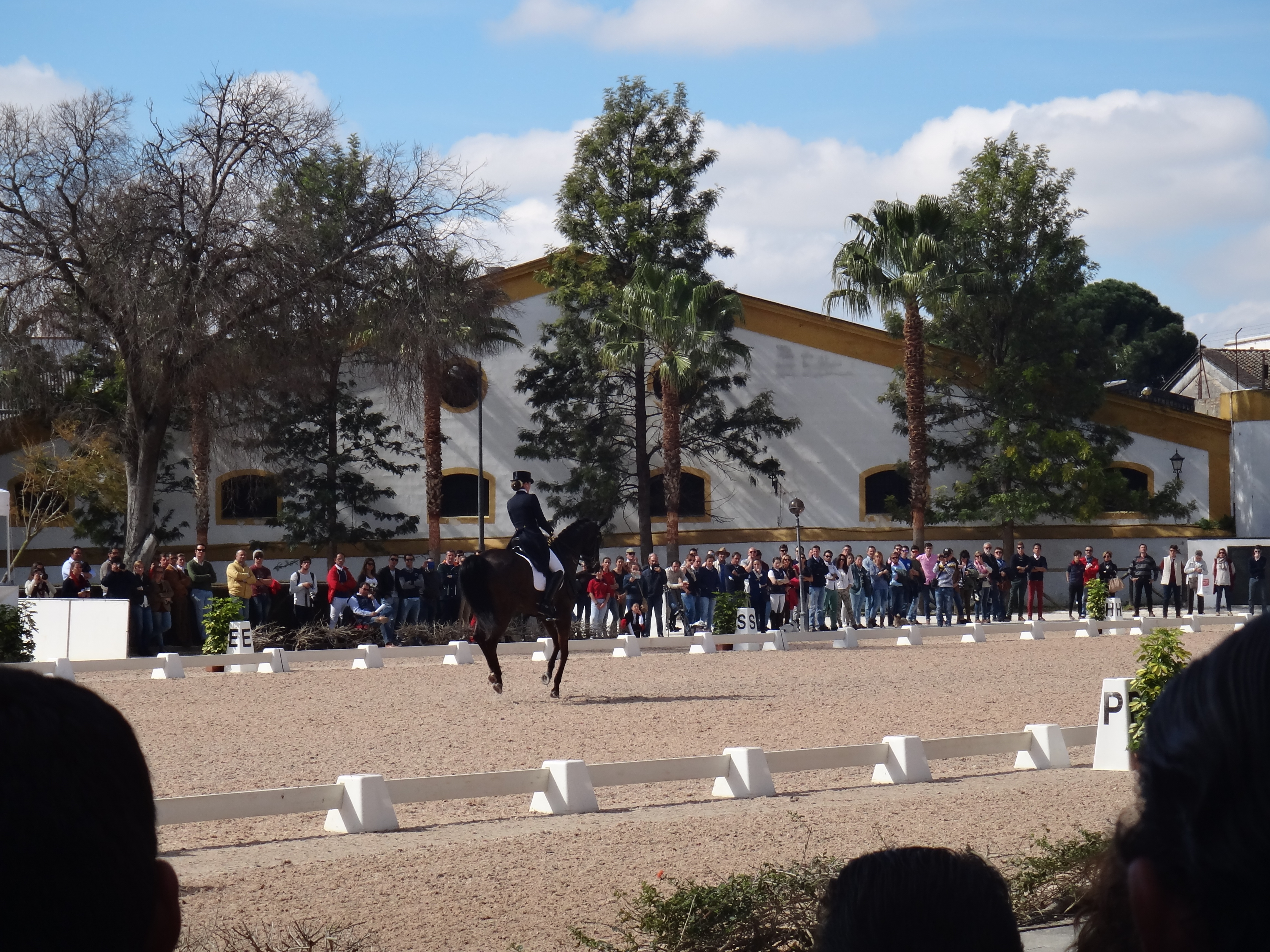 Concurso Internacional de Doma Clásica en la Real Escuela Andaluza del Arte Ecuestre de Jerez de la Frontera (Andalucía, España)